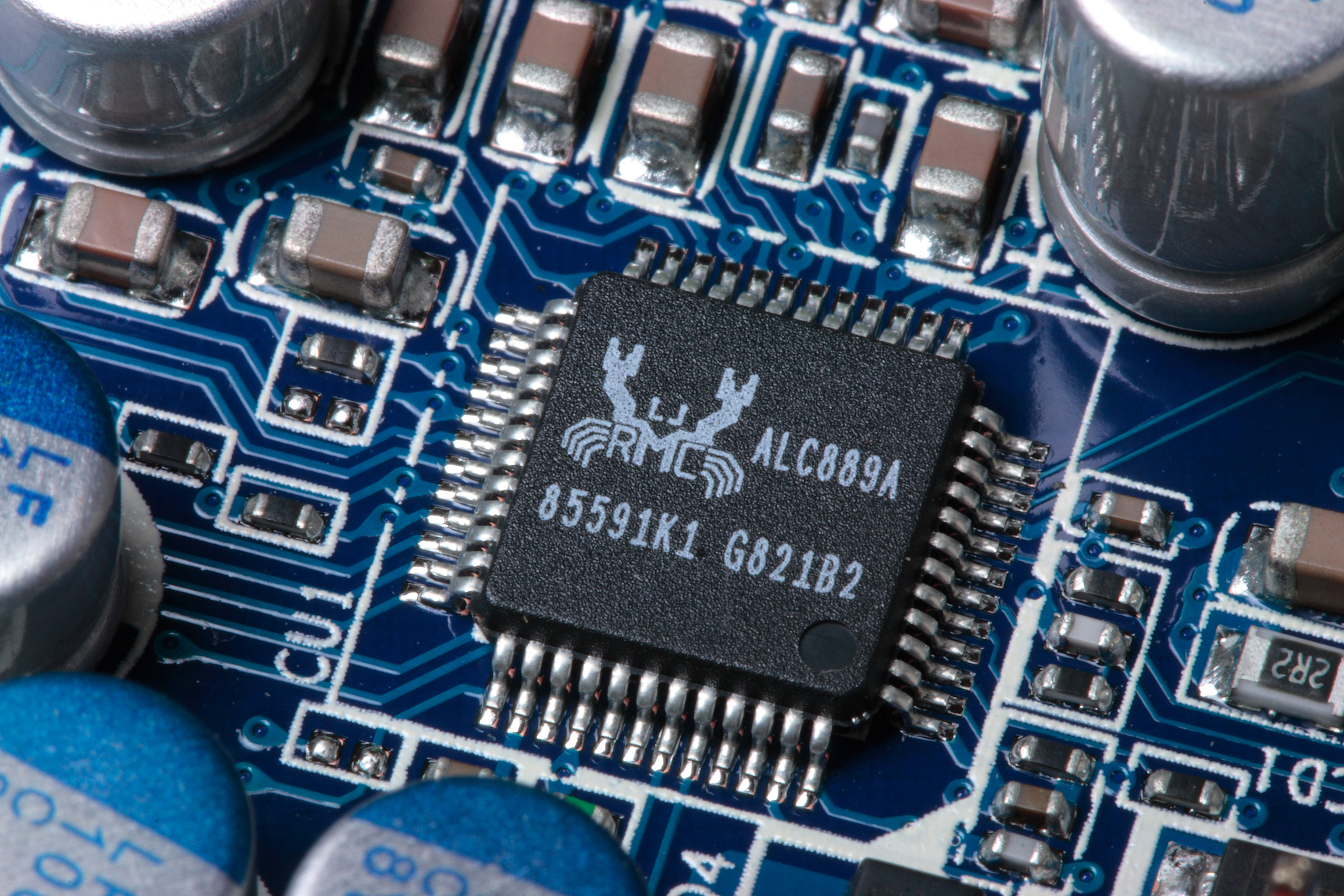 中文（台灣）: 瑞昱半導體音效晶片ALC889A。